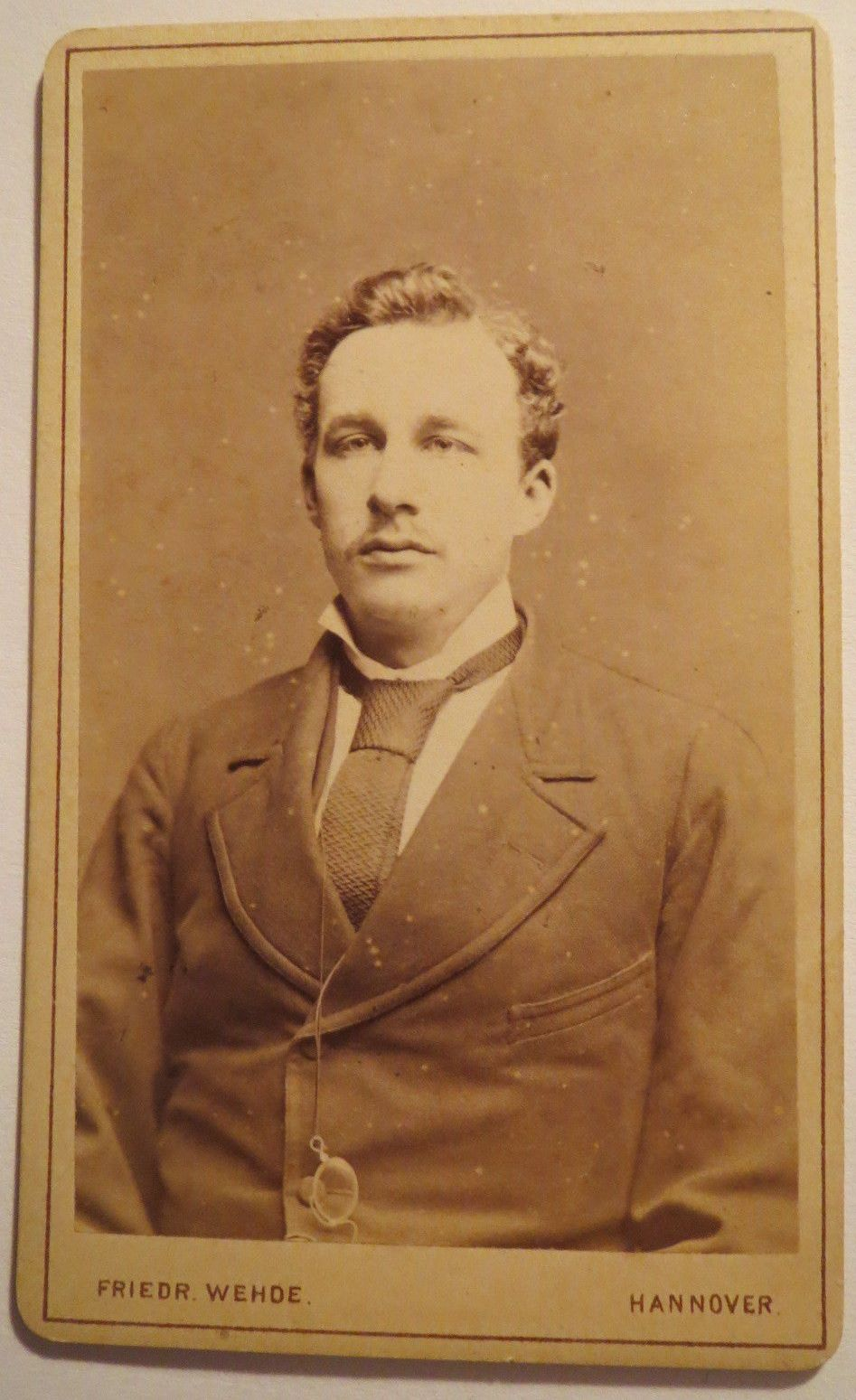 E. Jakobi seinem lieben Wutschke [in Tübingen] zur Freude. Ergebenst - Tübingen SS (18)81 - CDV. (E. Jakobi war wohl Student in Tübingen, da Herr Wutschke dort lebte.)